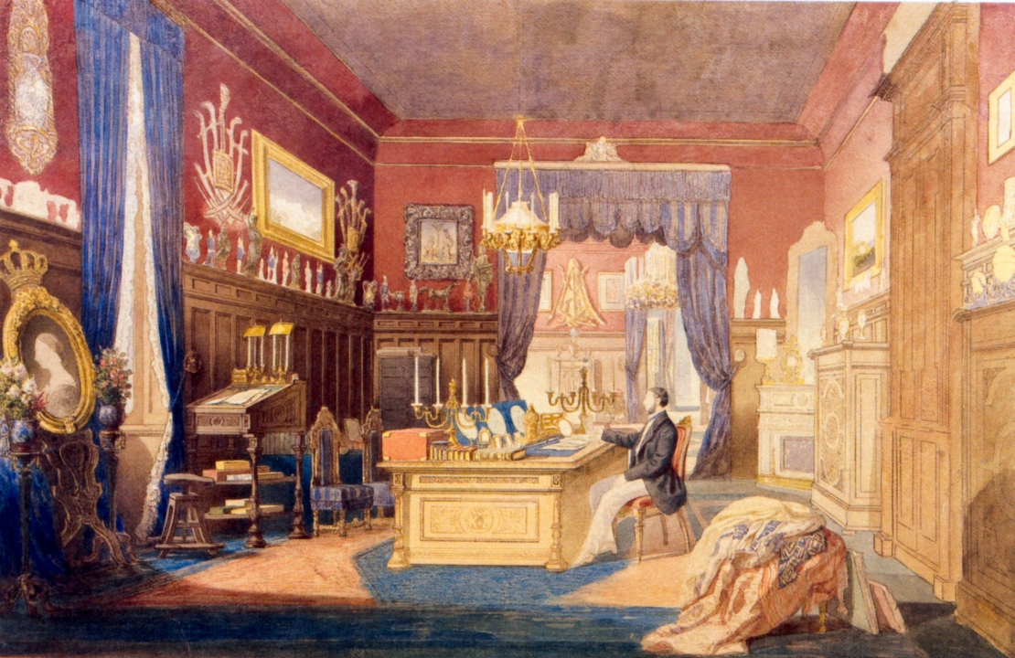 Carol Popp de Szathmary - Carol I în biroul de lucru de la Cotroceni,Muzeul Naţional de Artă al Românieiaquarelle on cardboard, 54x73,5 cm